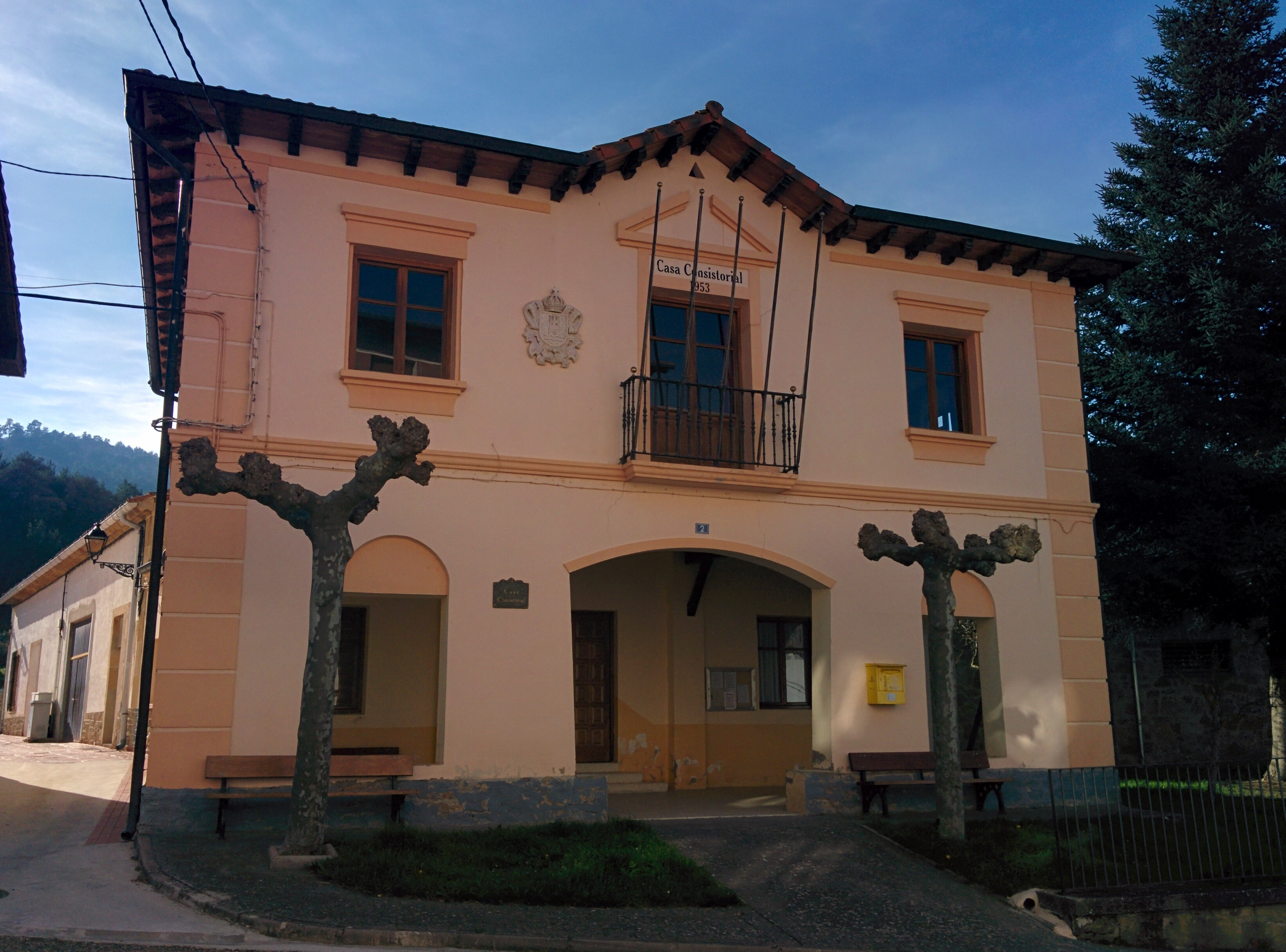 Casa consistorial de Jurisdicción de San Zadornil, en San Zadornil (Burgos, España).